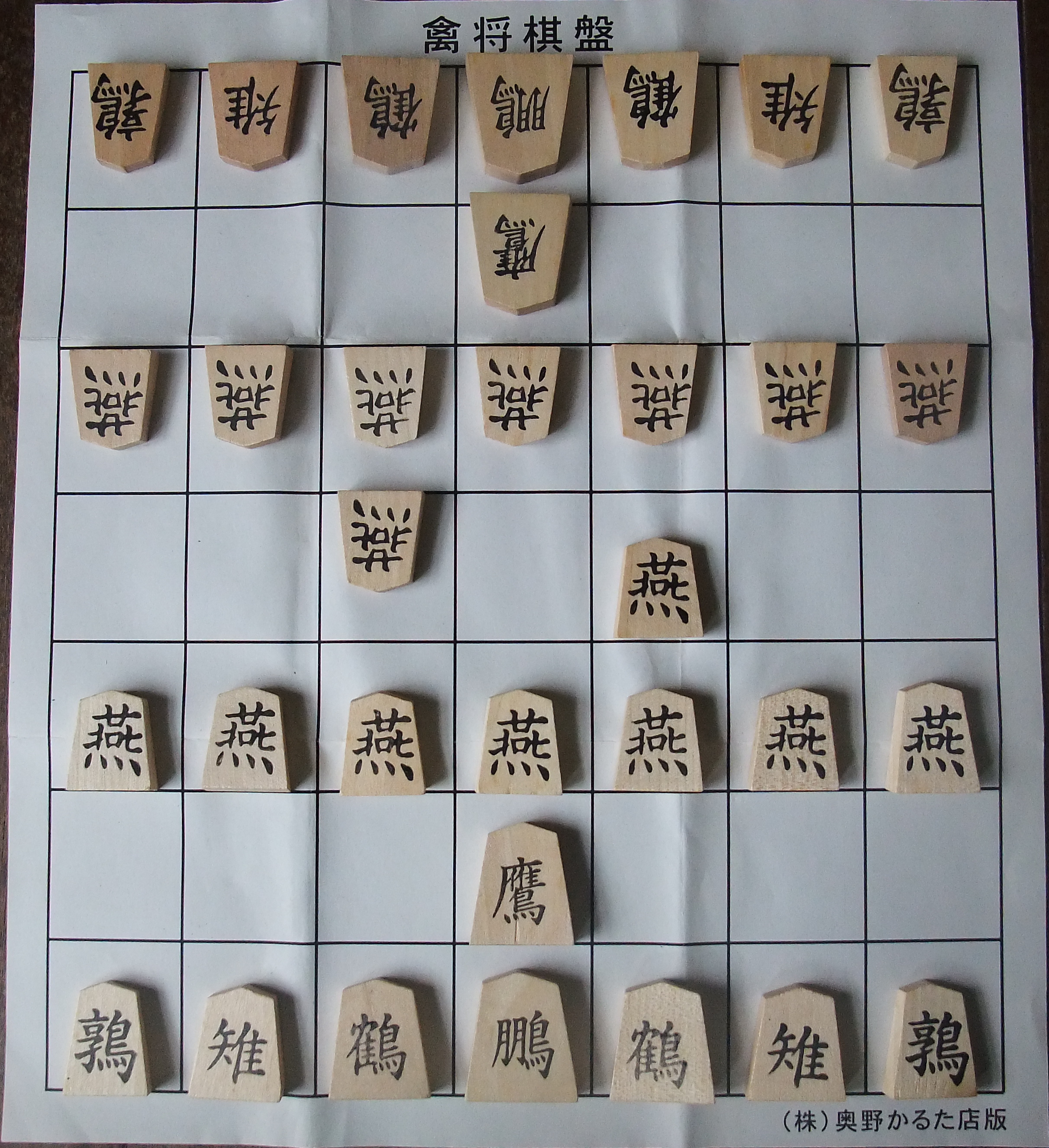 禽將棋，攝於嘉義溪口祖宅